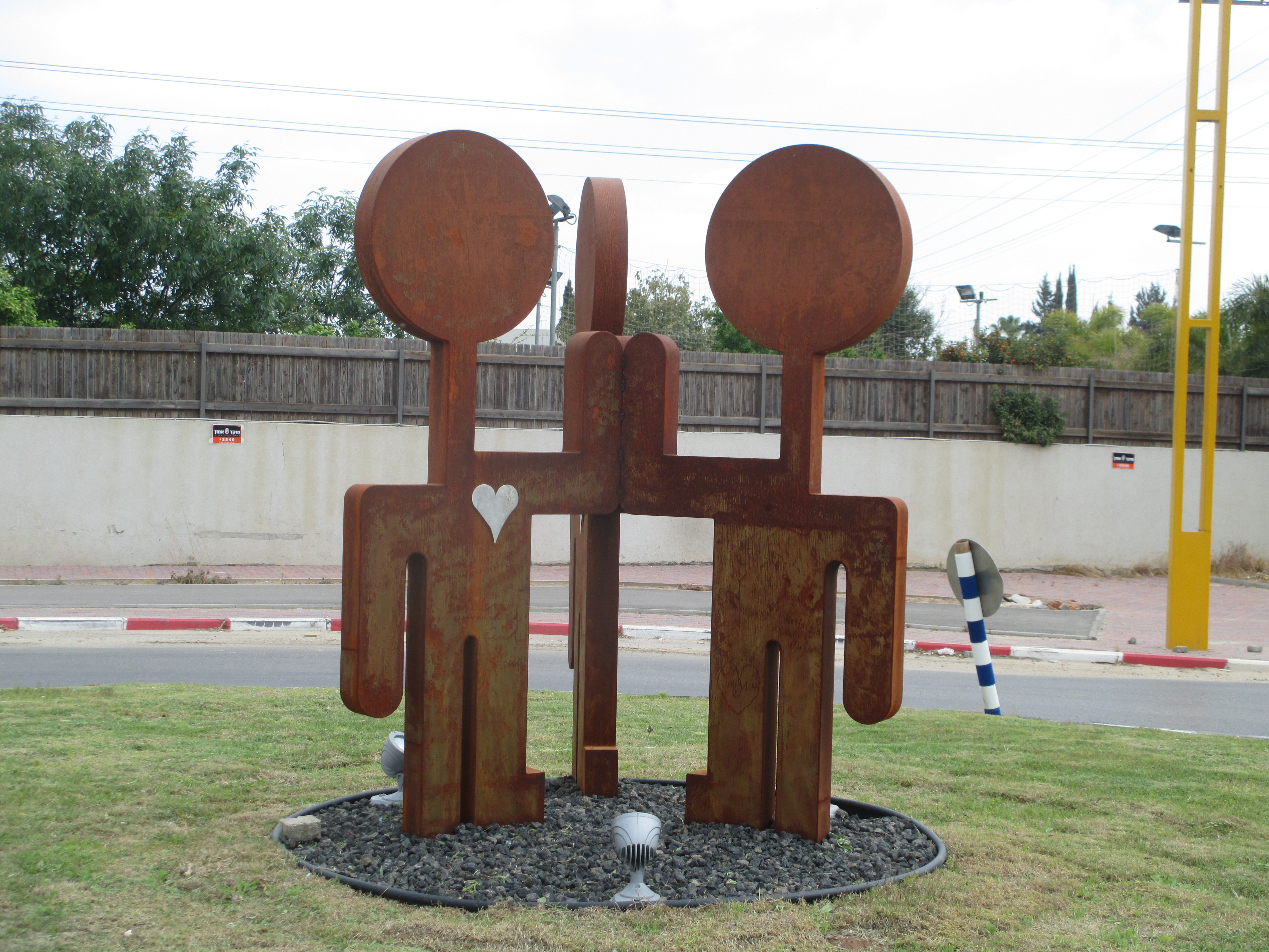 הפסל "יחד" בגני תקווה